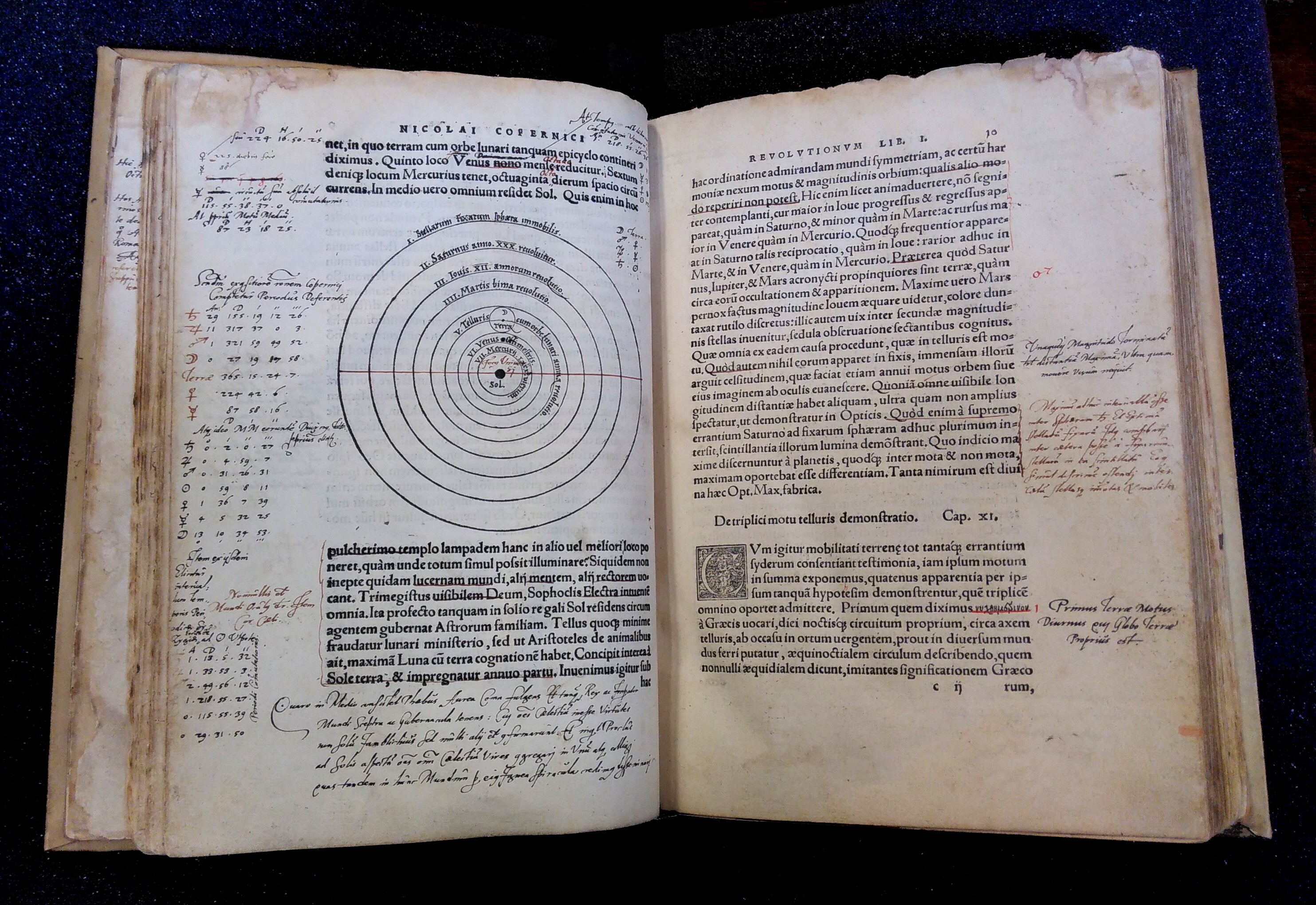 Exemplaire imprimé (première édition) avec xylographies et annotations manuscrites de deux commentateurs et correcteurs de Copernic: Erasme Reinhold (1511-1551) et Paul Wittich (ca 1550-1587) This is a file created at the museum: Library of Université de Liège